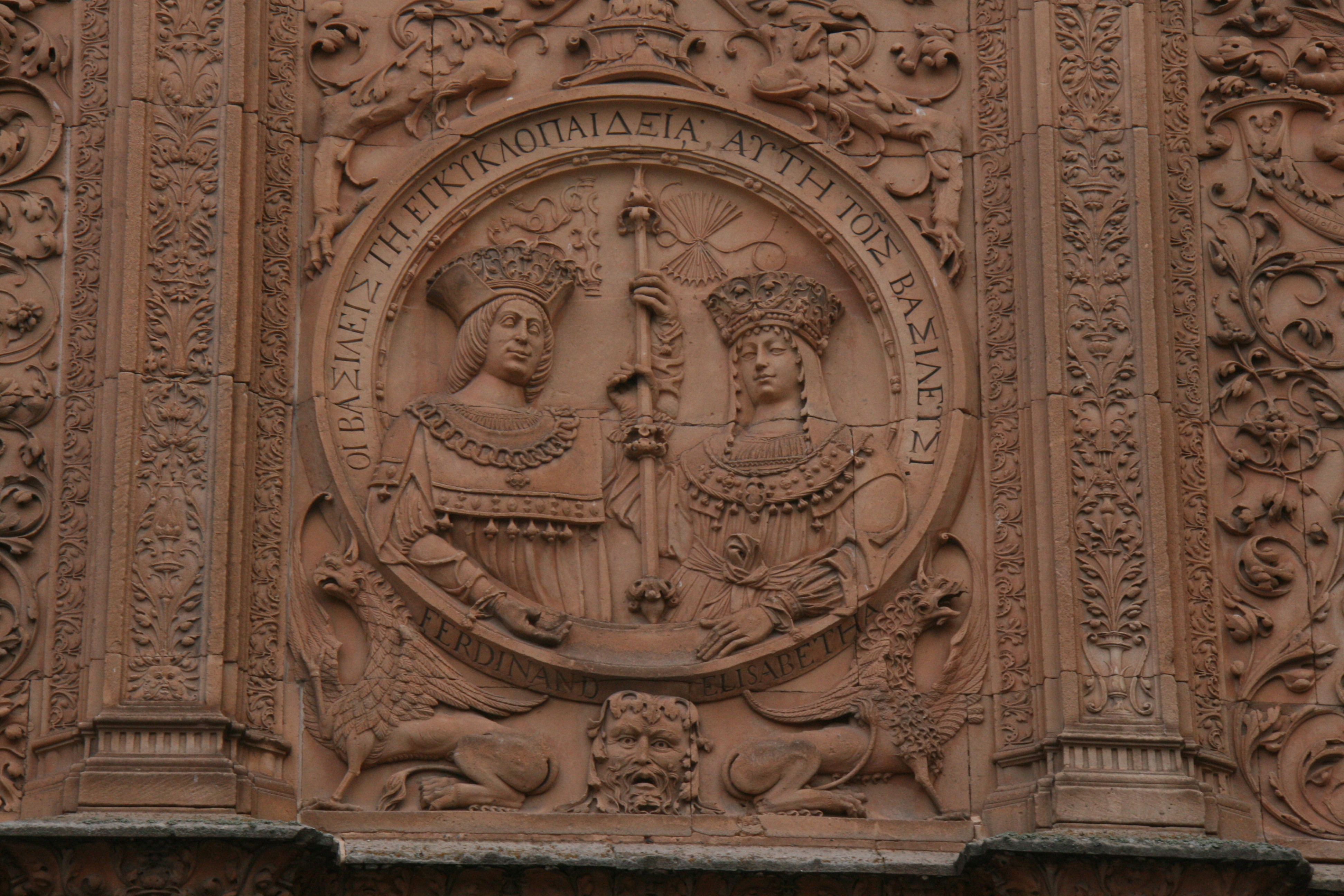 Fachada de la Universidad. Medallón de los Reyes Católicos con inscripción que lee: “ΟΙ ΒΑΣΙΛΕΙΣ Τῌ ΕΝΚΥΚΛΟΠΑΙΔΕΙᾼ, ΑΥΤΗ ΤΟῖΣ ΒΑΣΙΛΕΙΣΙ”—Los Reyes para la Educación; Ésta para los Reyes.